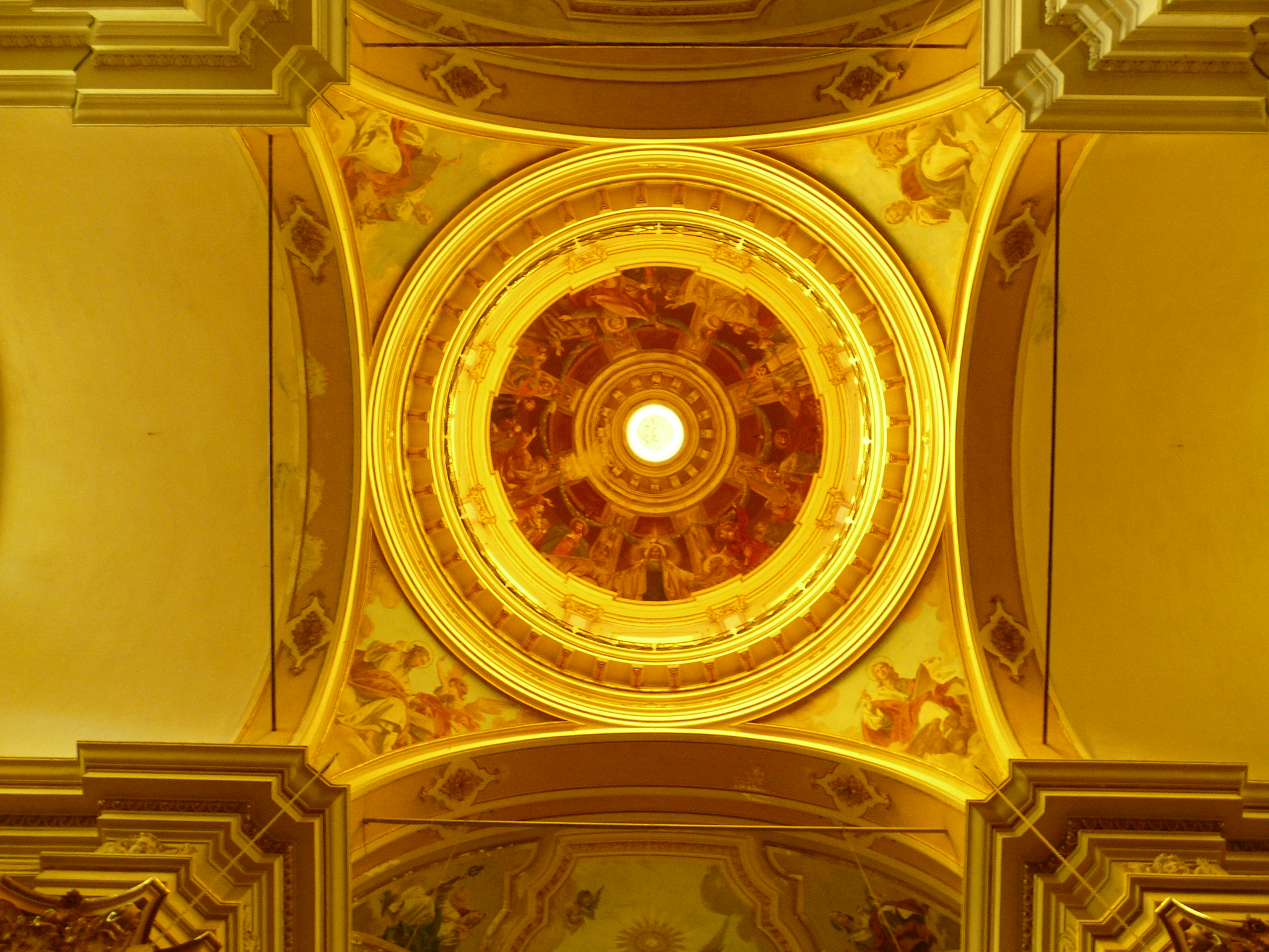 Cupola interna della chiesa di Santa Maria della Neve, Borgonovo Ligure, Mezzanego, Liguria, Italia